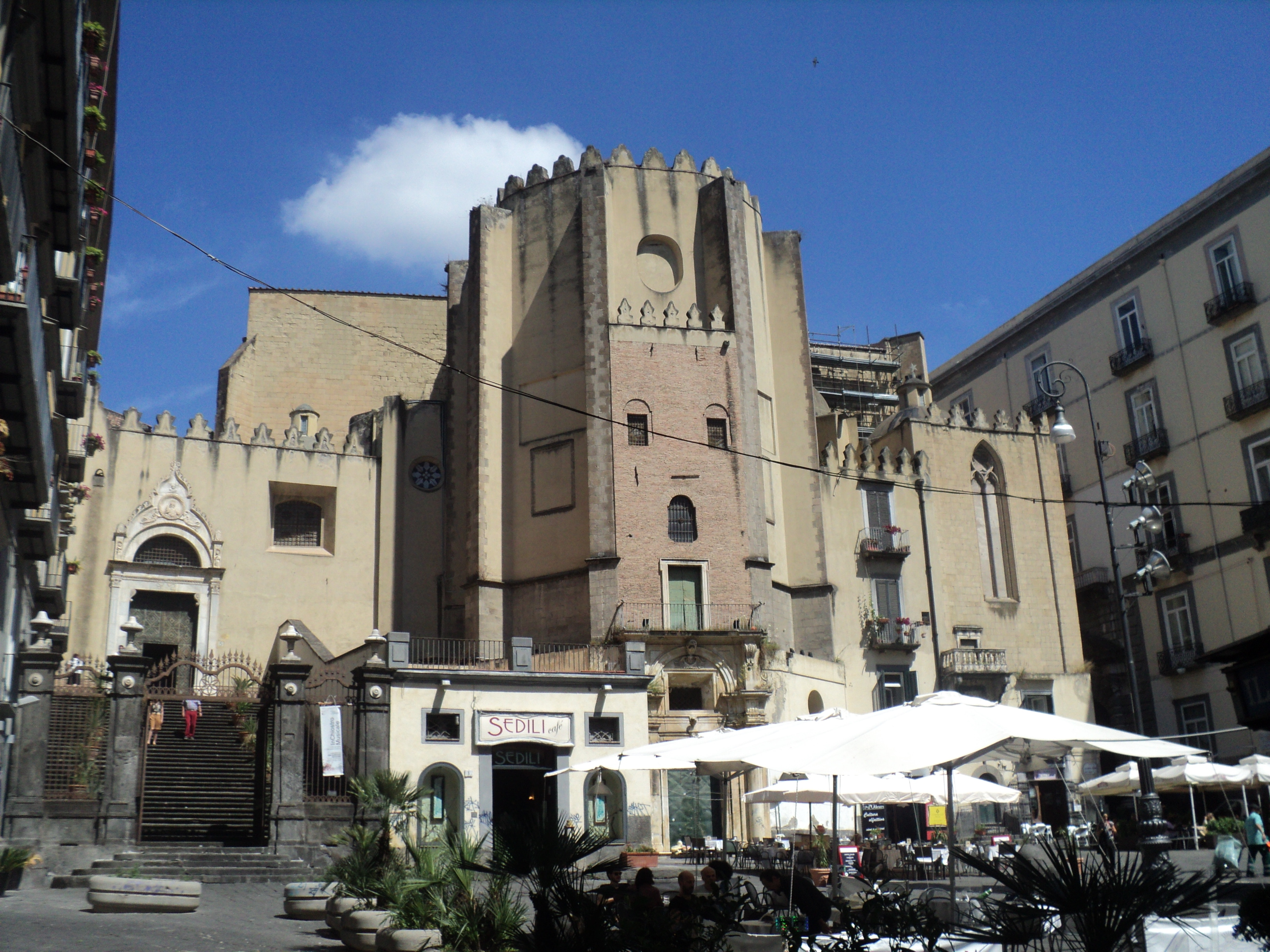 Chiesa di San Domenico Maggiore (Napoli)